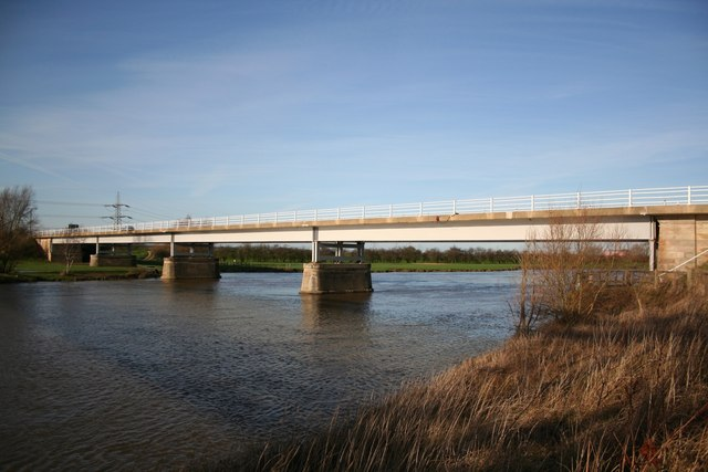 Dunham Bridge over River Trent